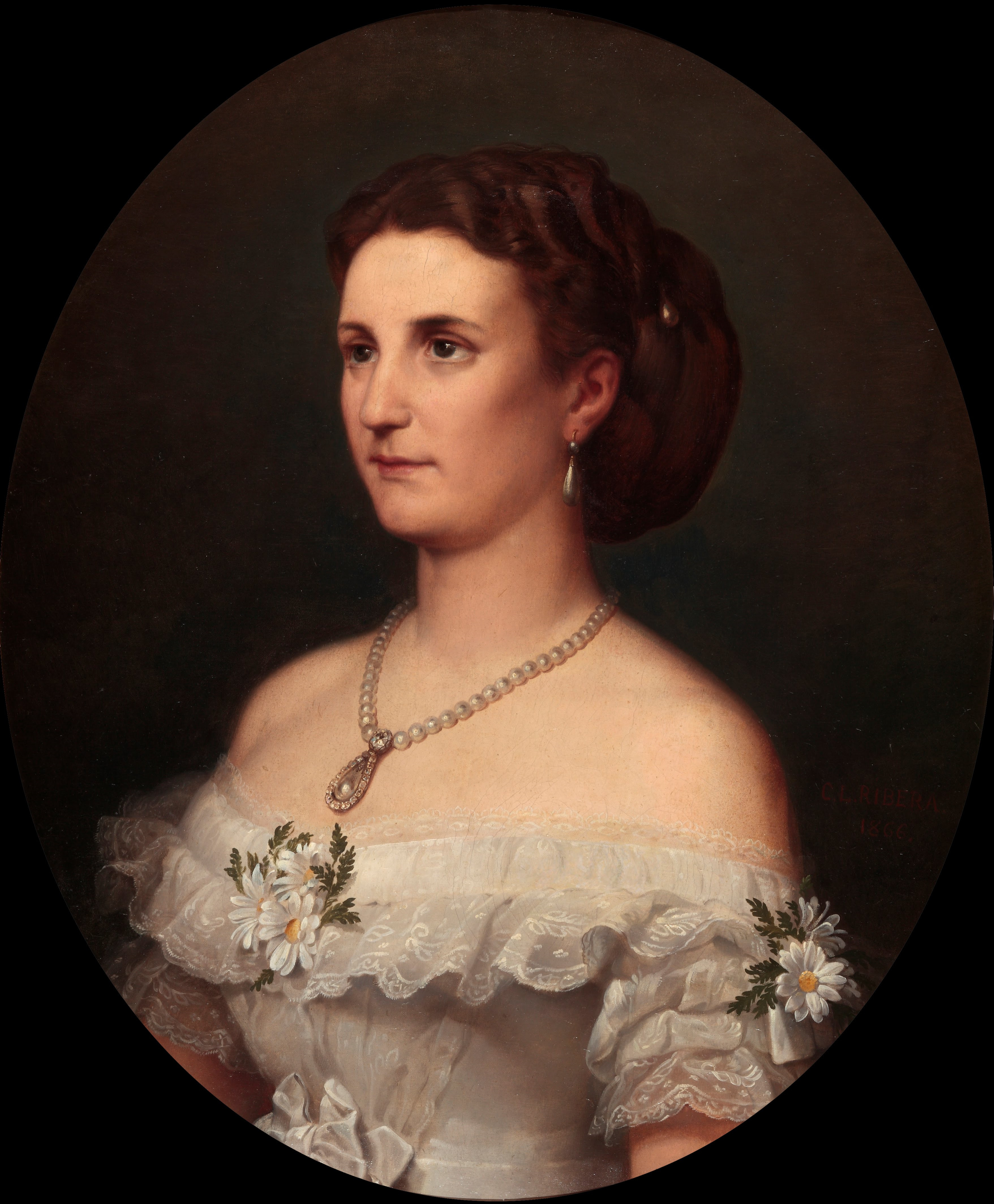 Retrato de María Leonor de Salm-Salm, que fue duquesa consorte de Osuna por su matrimonio con su primo, Mariano Téllez-Girón y Beaufort Spontin, XII duque de Osuna y XV duque del Infantado.